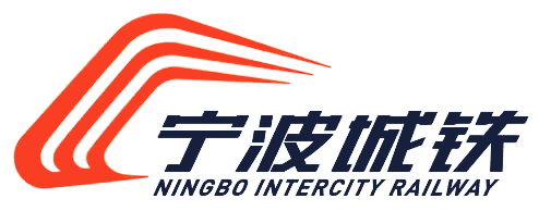 宁波城际铁路 Logo